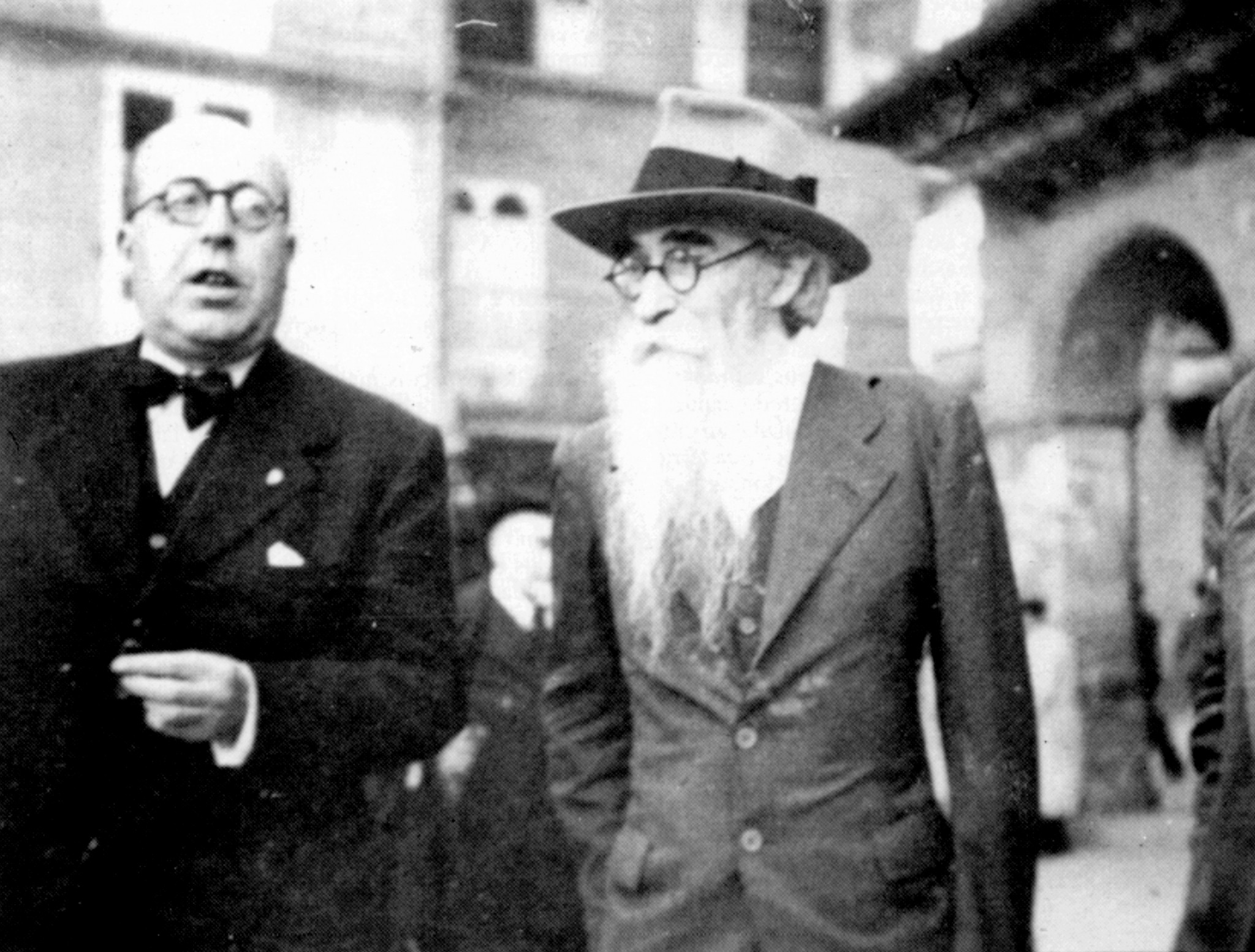 Ramón Otero Pedrayo e Ramón María del Valle-Inclán na Praza Maior de Ourense